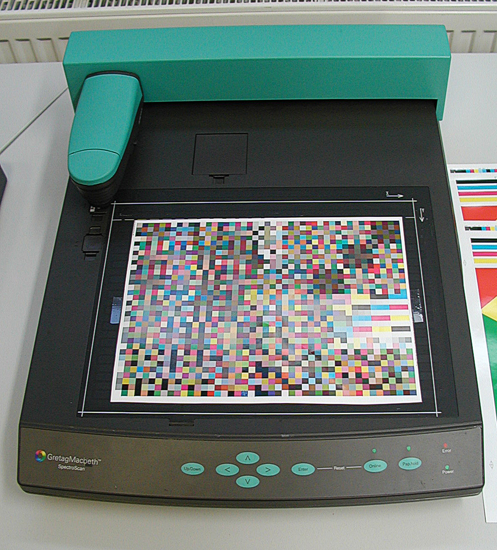 Ein SpectroScan der Firma GretagMacbeth